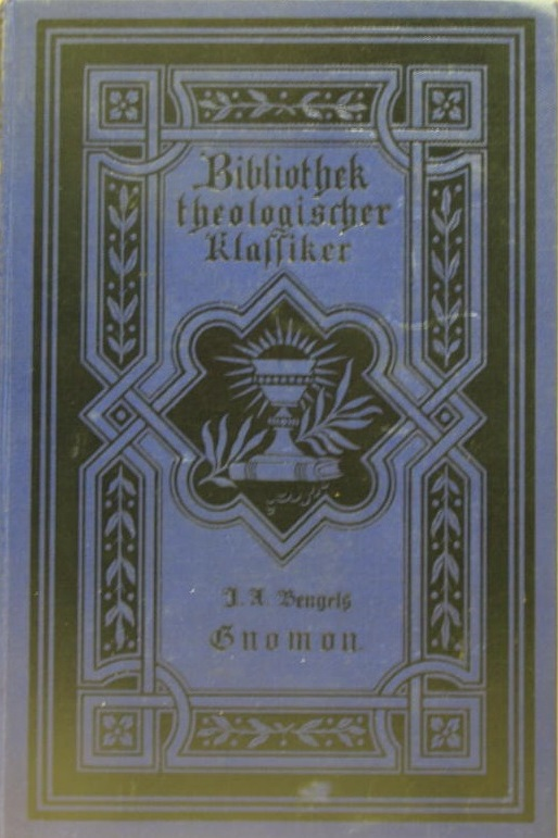 Einbanddeckel der Ausgabe von Bengels Gnomon in der Bibliothek theologischer Klassiker